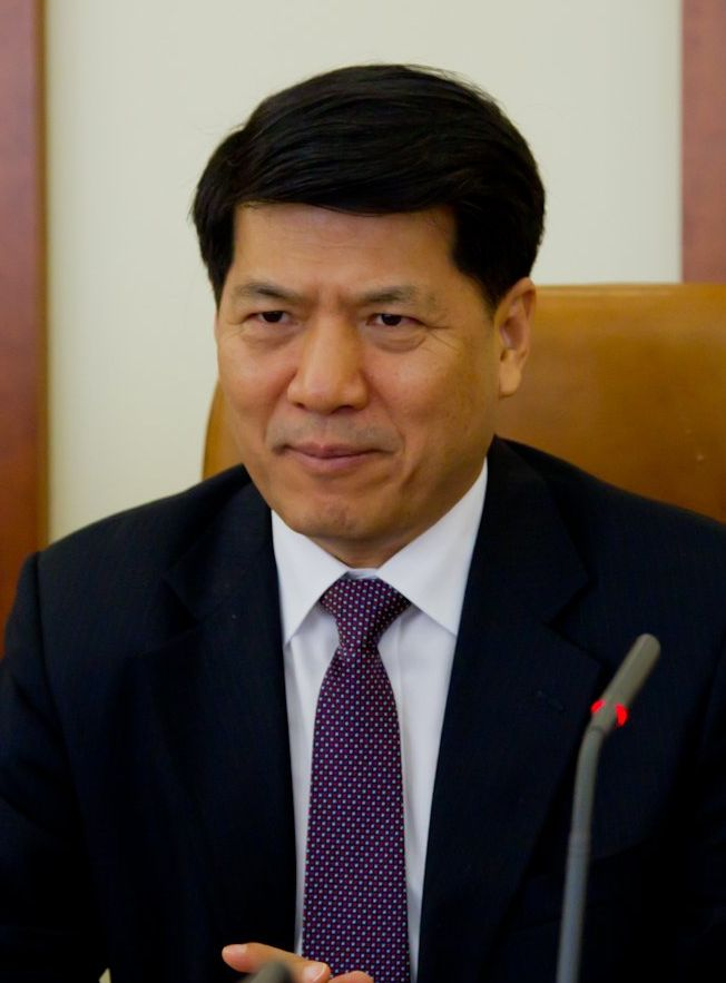 Ли Хуэй — китайский дипломат, посол Китая в России